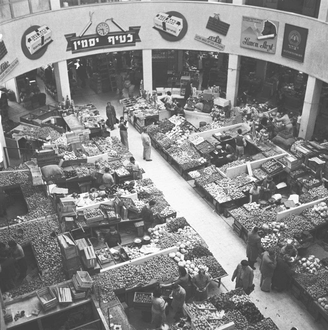 אוסף צילומים של הצלם זולטן קלוגר טווח מספרי התשלילים 30890 - 30999: חיפה - הדר הכרמל - אולם השוק